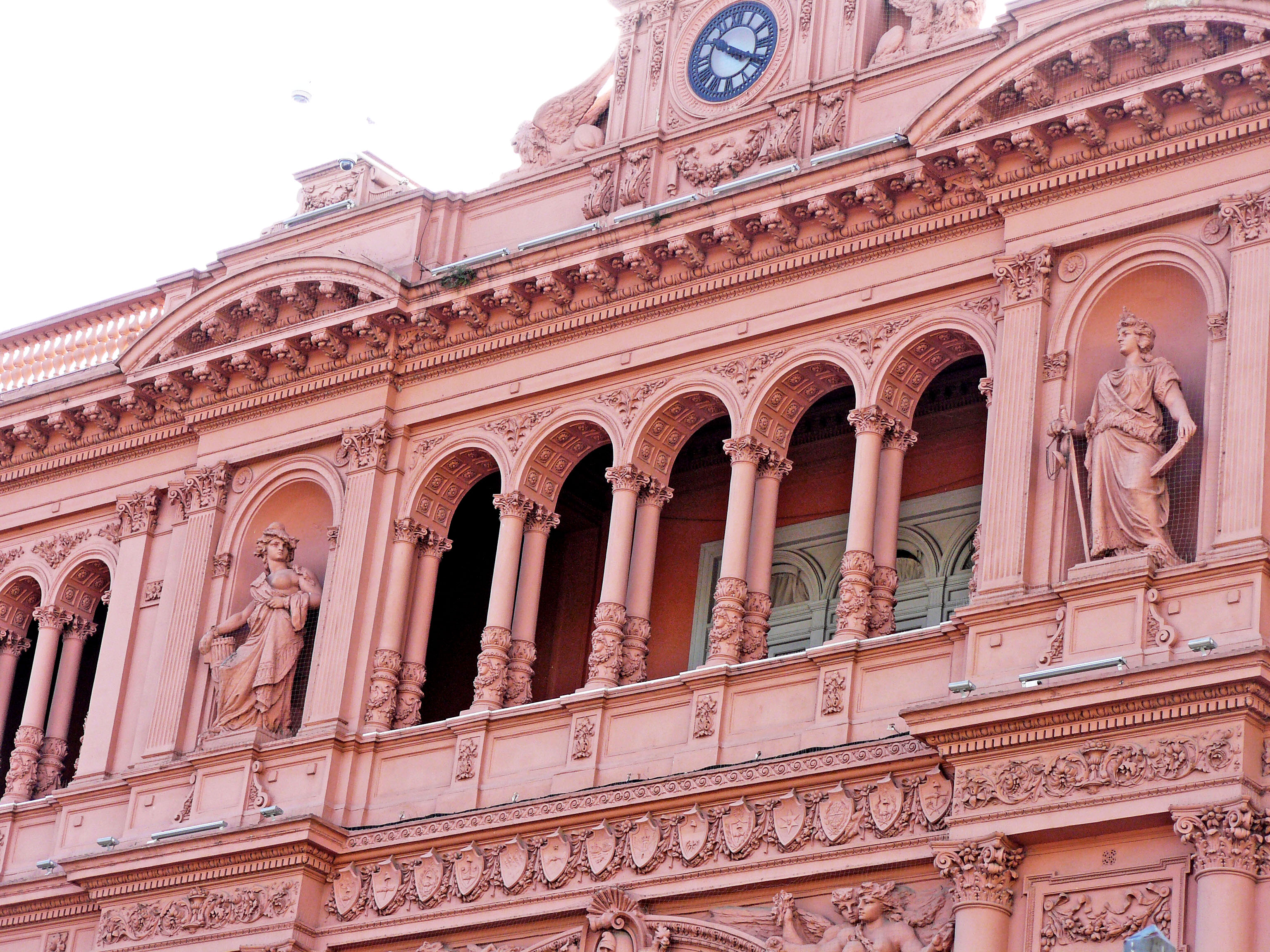 Balcón de la Casa Rosada, Buenos Aires, Argentina. Desde este balcón dieron sus discursos Juan Domingo Perón y su esposa, Eva Perón.